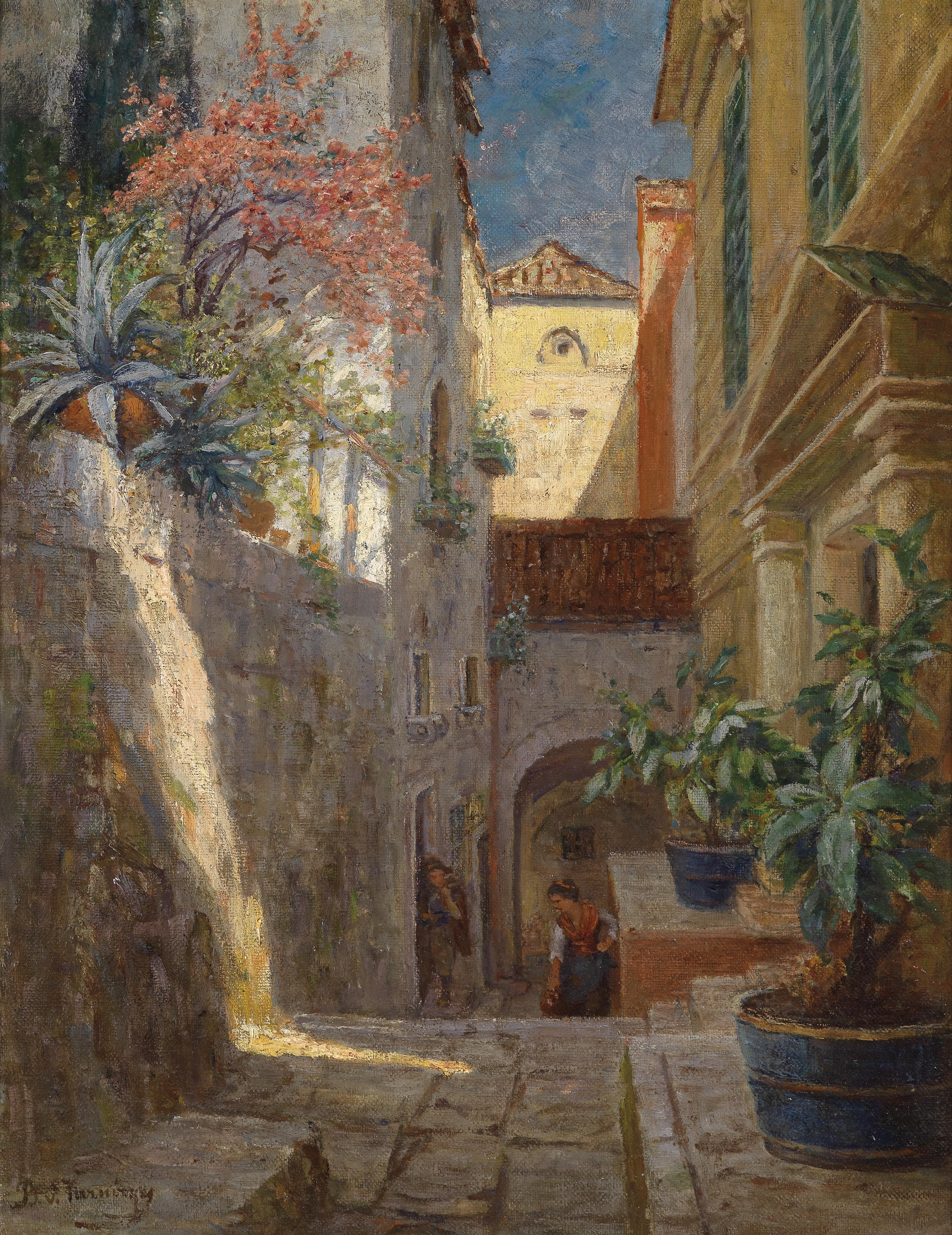 Blick in eine südliche Gasse